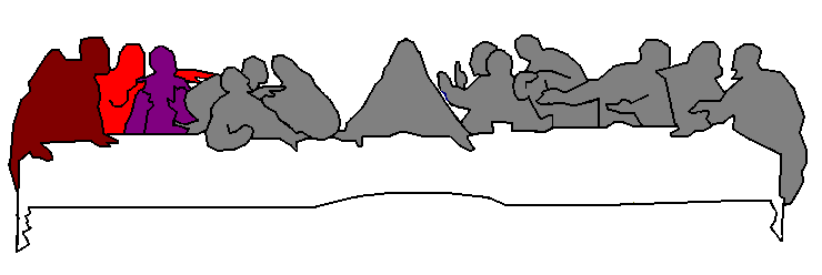 Last supper by Leonardo da Vinci